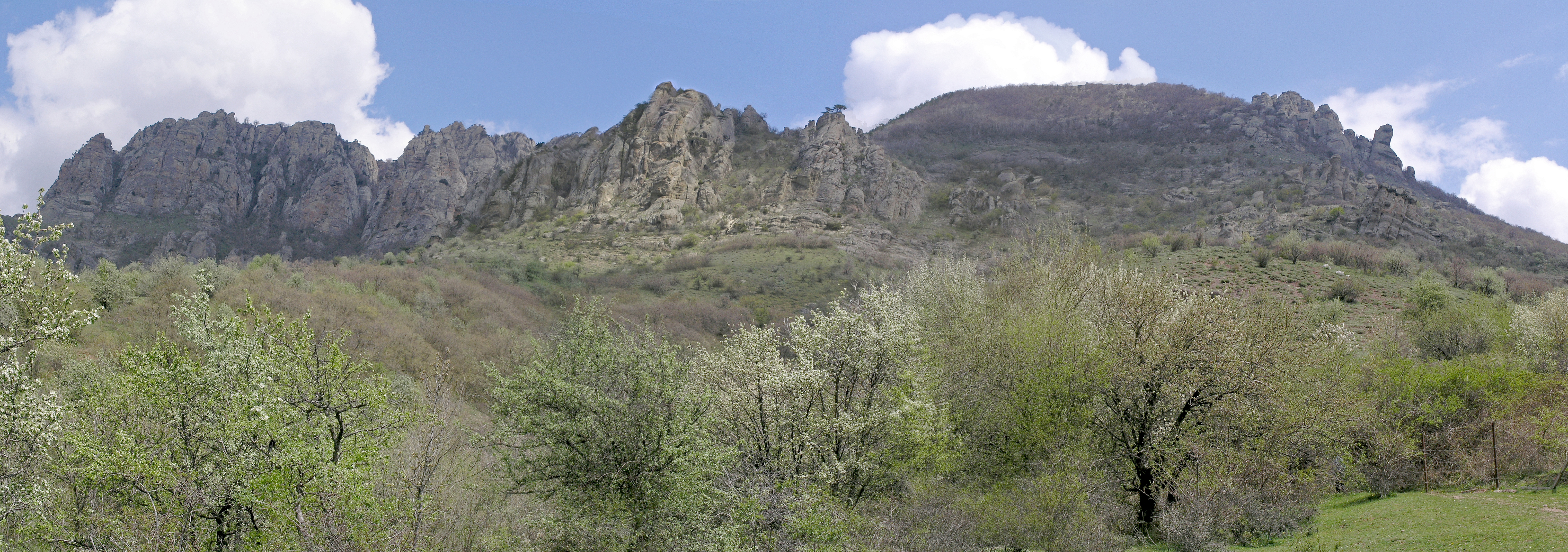 Украина, Крым, панорама горы Южный Демерджи